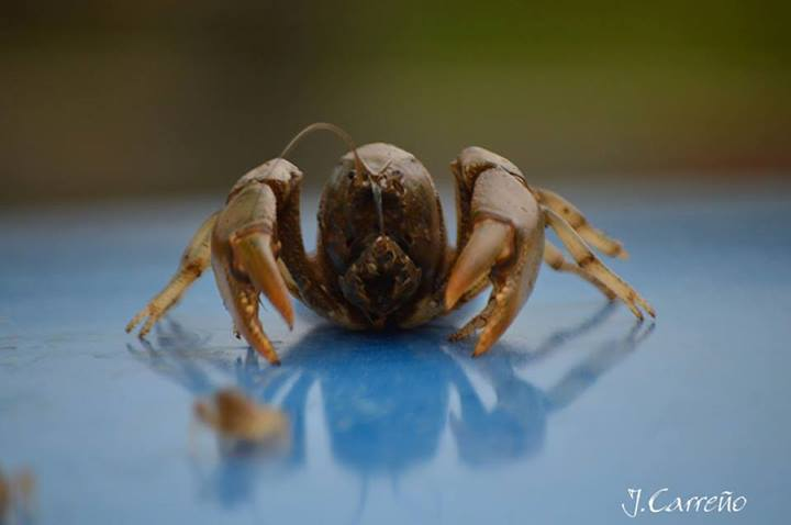 camaron langosta de agua dulce de frente